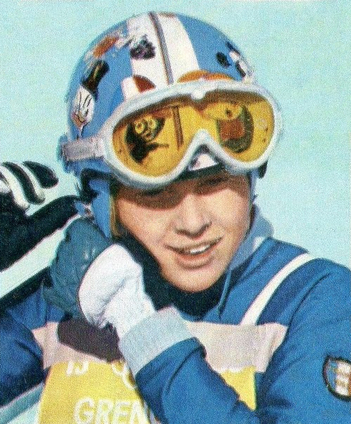 CAMPIONI dello SPORT 1968/69-n.353- STEURER - SPORT INVERNALI (FRA)-Rec